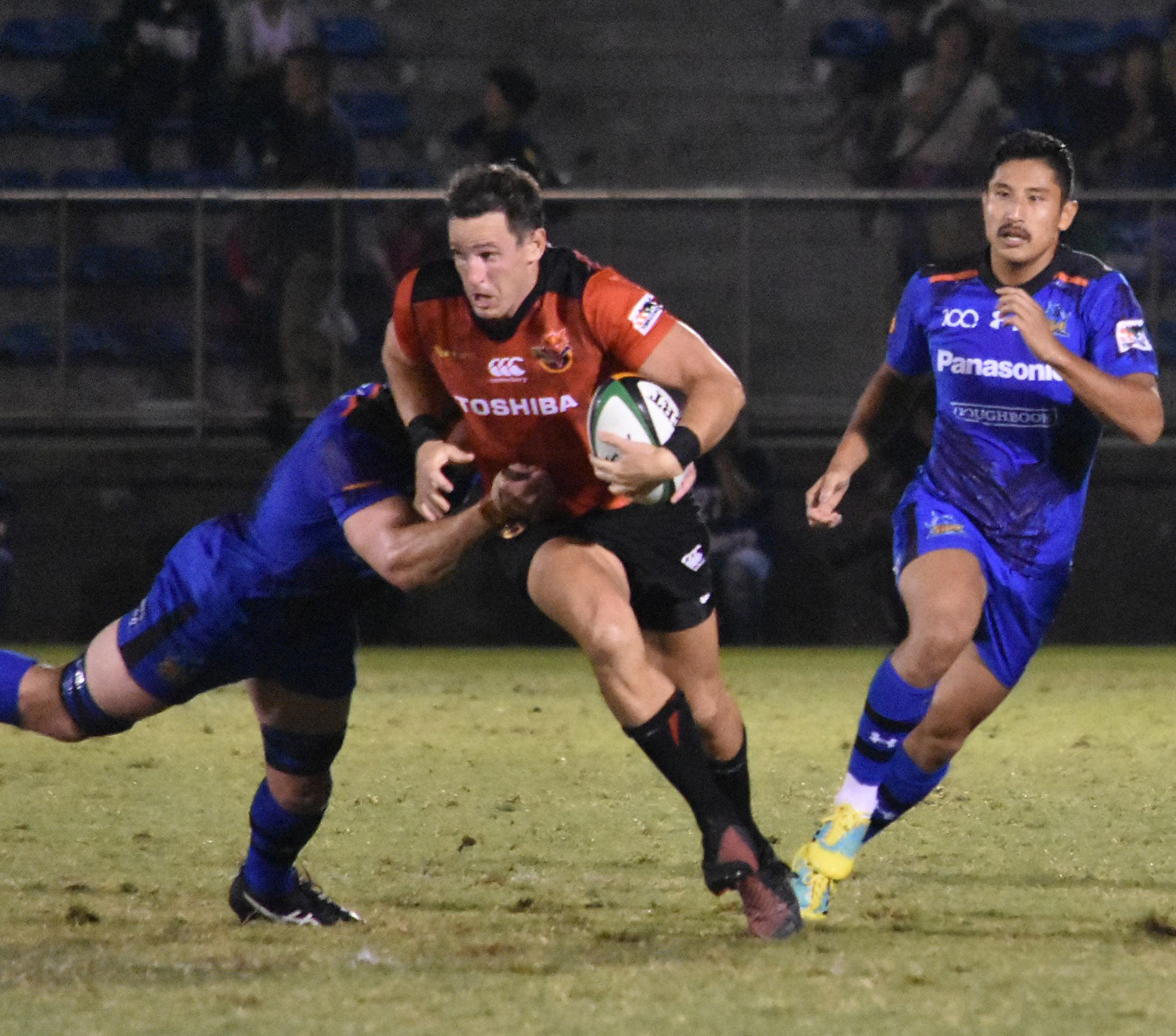 マイク・ハリス